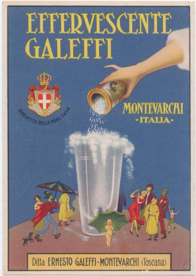 Cartolina pubblicitaria per la Ditta Ernesto Galeffi di Montevarchi, sec. XX inizio (AS Isernia, Raccolta di cartoline Cifelli)